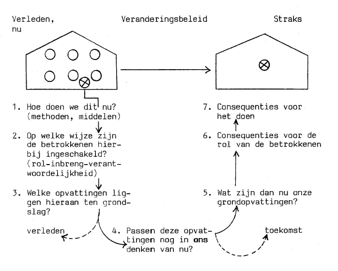 Schematische weergave van de u procedure